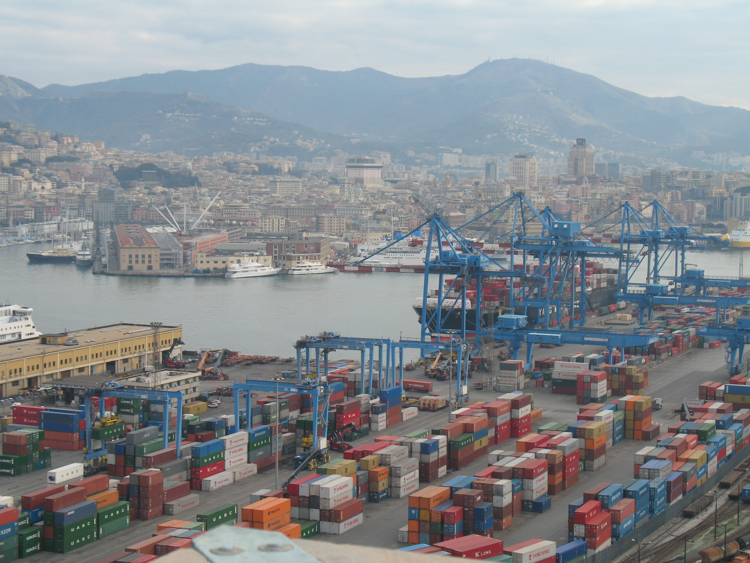 Immagine dal Porto di Genova (terminal, moli, container, calate, ecc.)